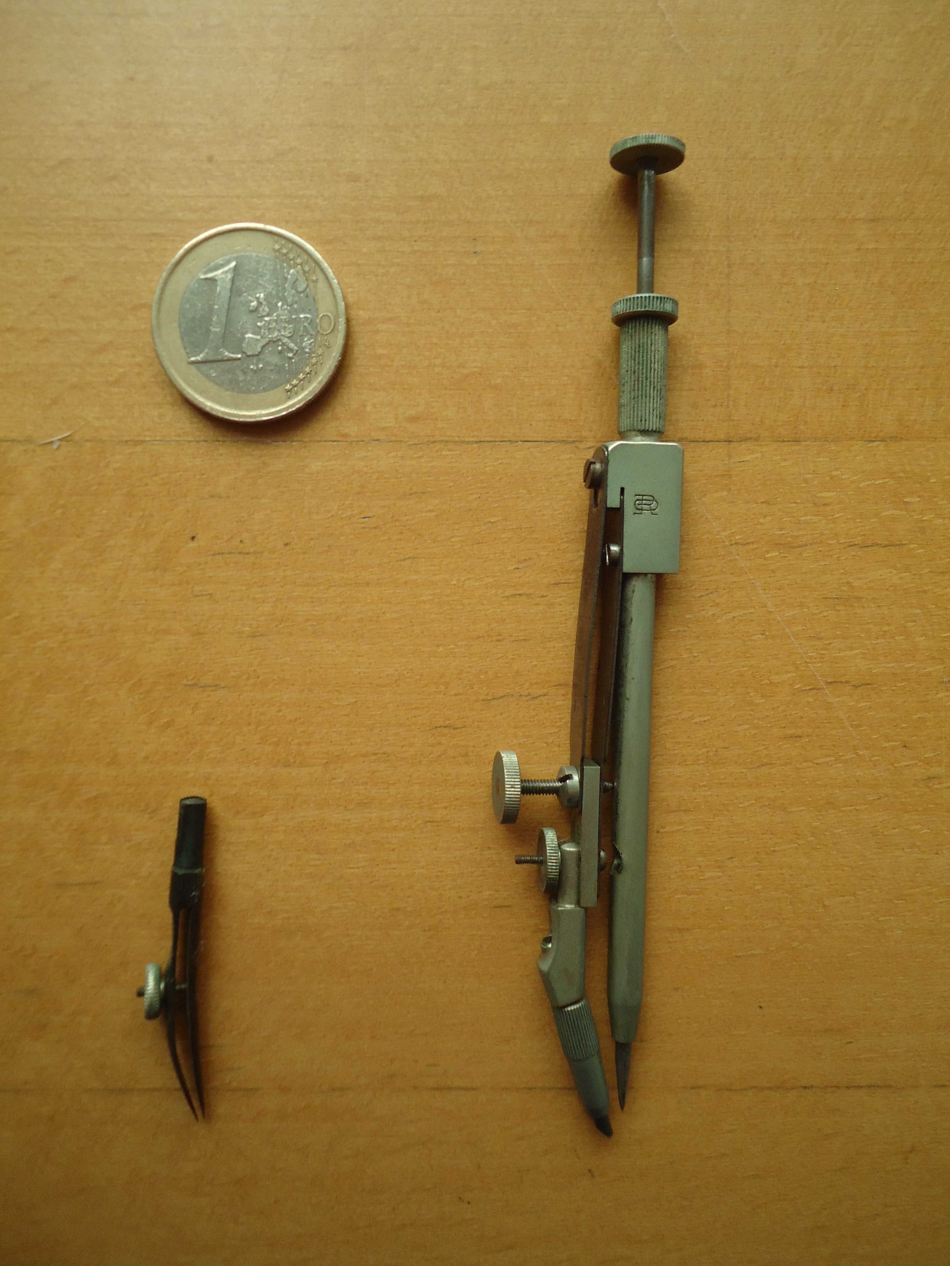 Caja de compases (E.O. Richter&Co). Bigotera loca y sus utensilios